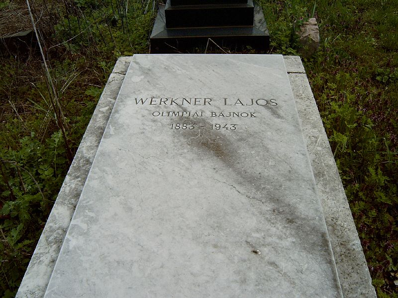 Werkner Lajos sírja Budapesten. Kozma utcai izraelita temető: 5-27-1.